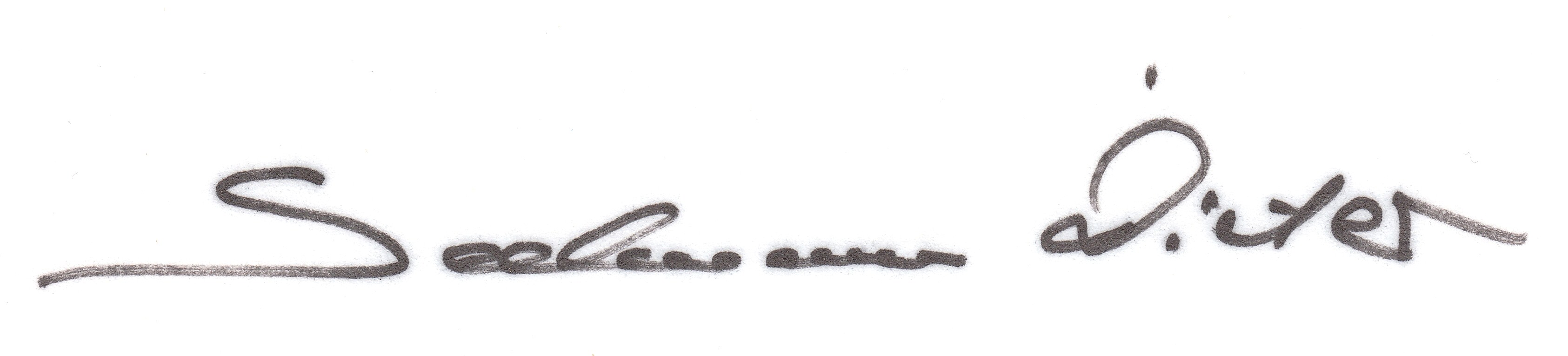 Autogramm von ca. 1978